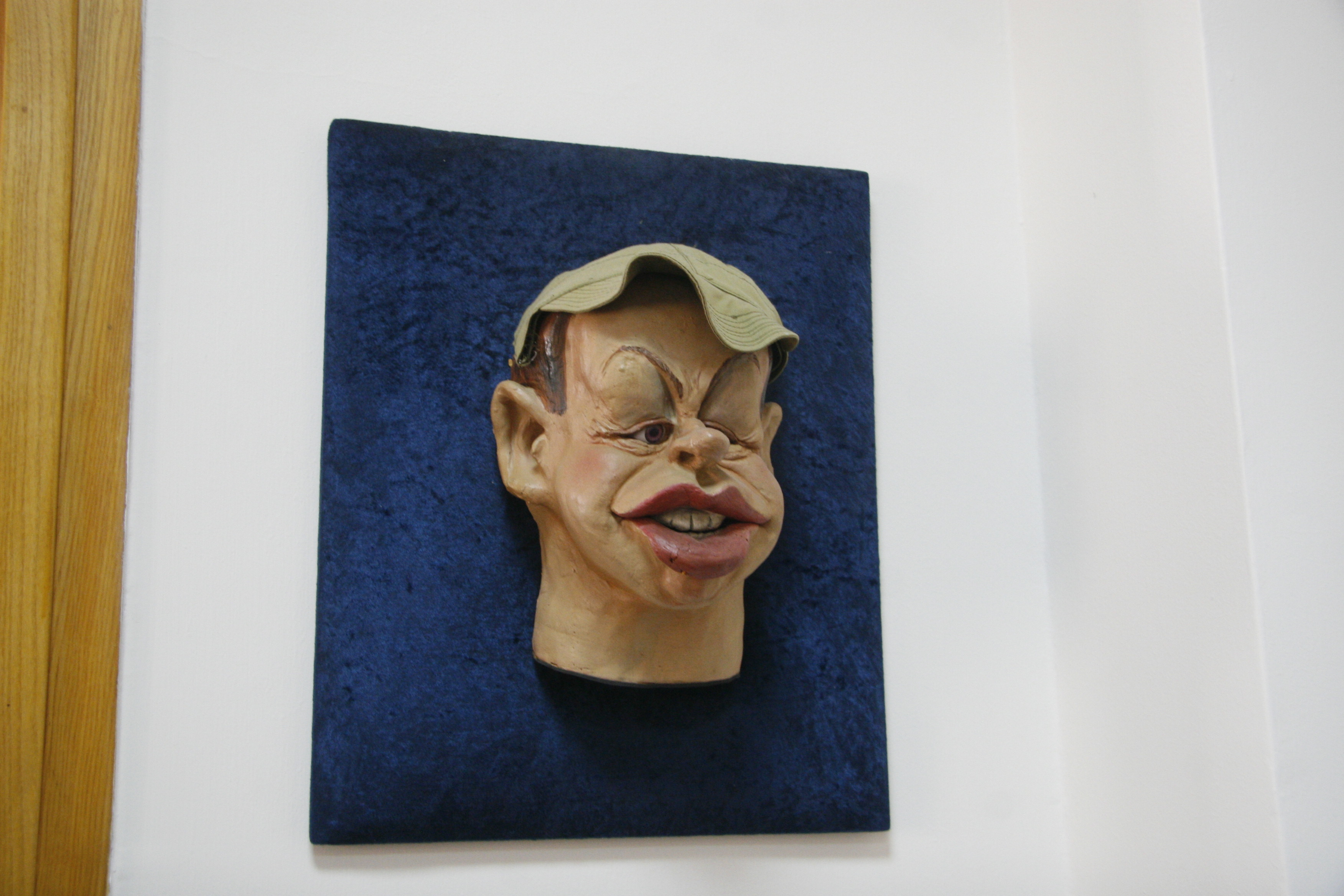 חרצוף של נתן שרנסקי